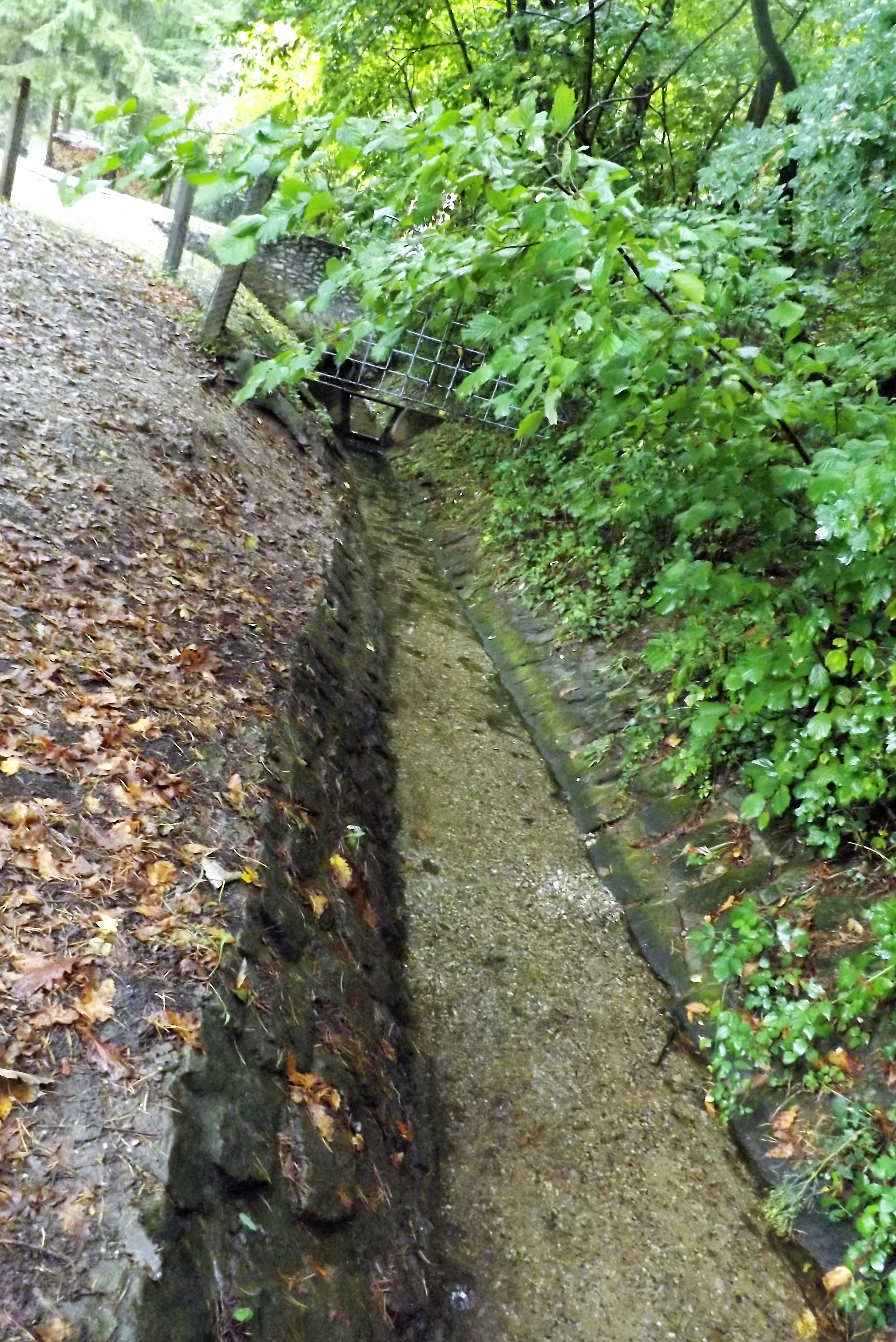 A Lator forrásbarlangból eredő patak Latorfőnél, Sály